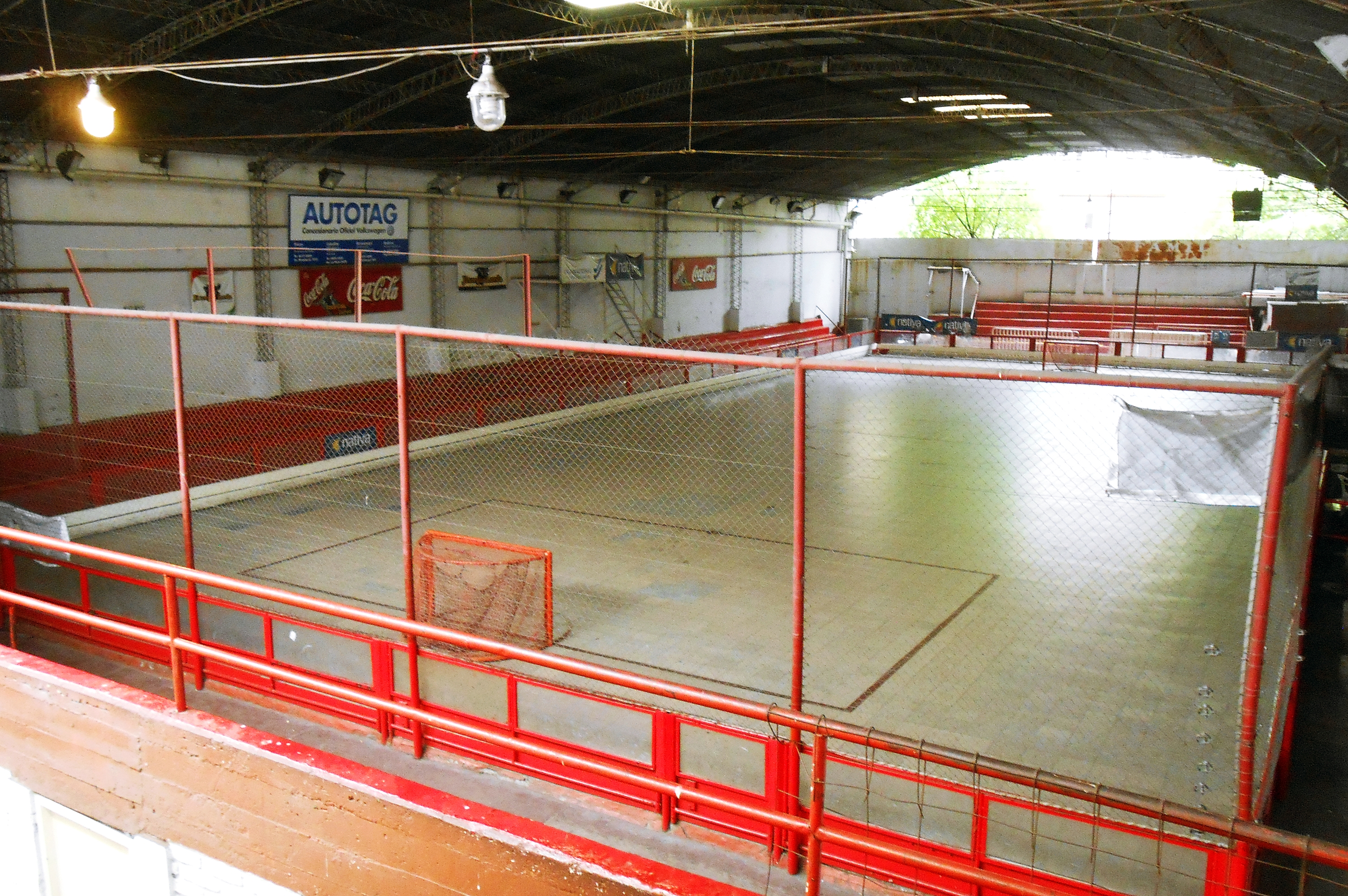 Cancha de hockey del C.A. Huracan, Parque Patricios, Buenos Aires, Argentina.